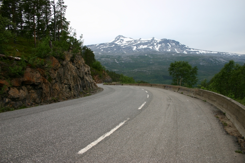 Riksvei 77, Junkerdal.